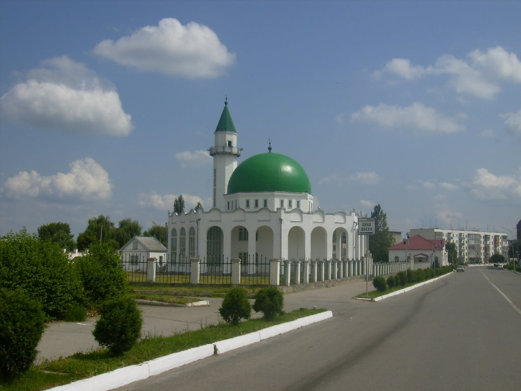 Находится в городе Нарткала.